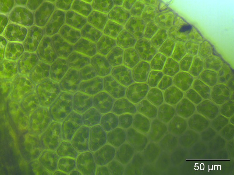 Durchscheinendes Georgsmoos Tetraphis pellucida, Laminazellen, Vergrößerung: 400x, Rostock